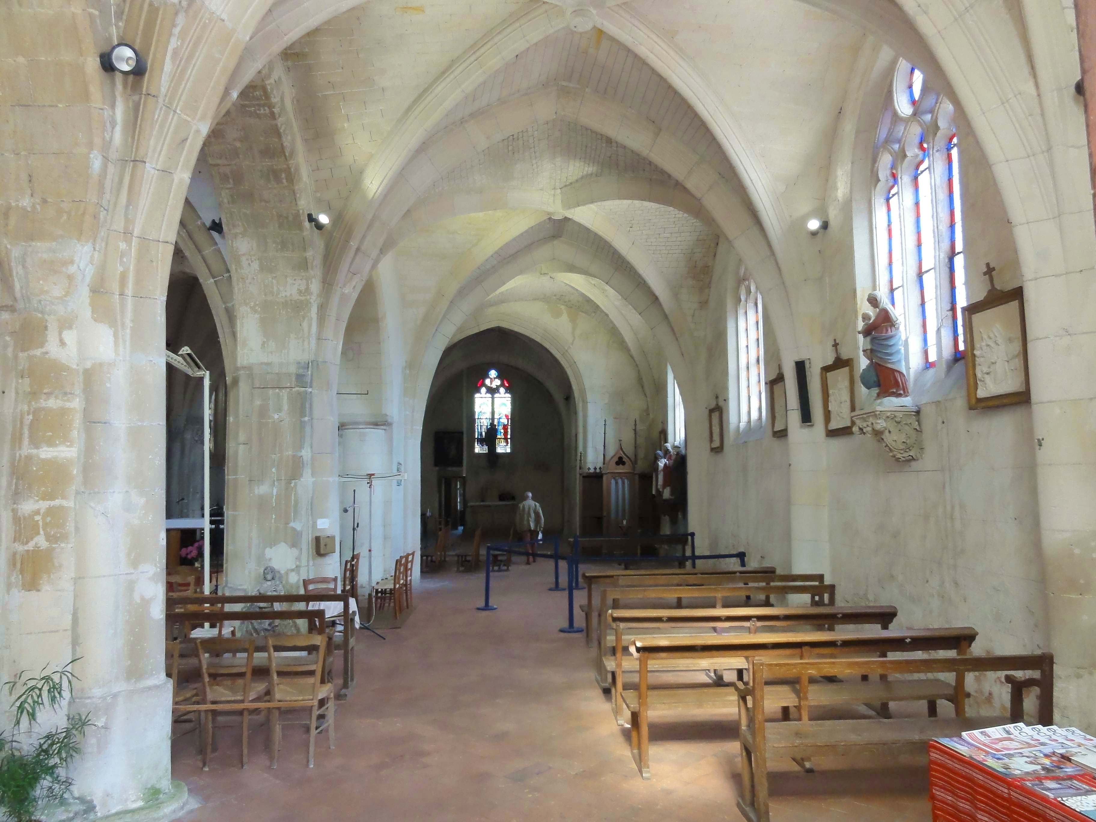 Intérieur de l'église (voir titre).